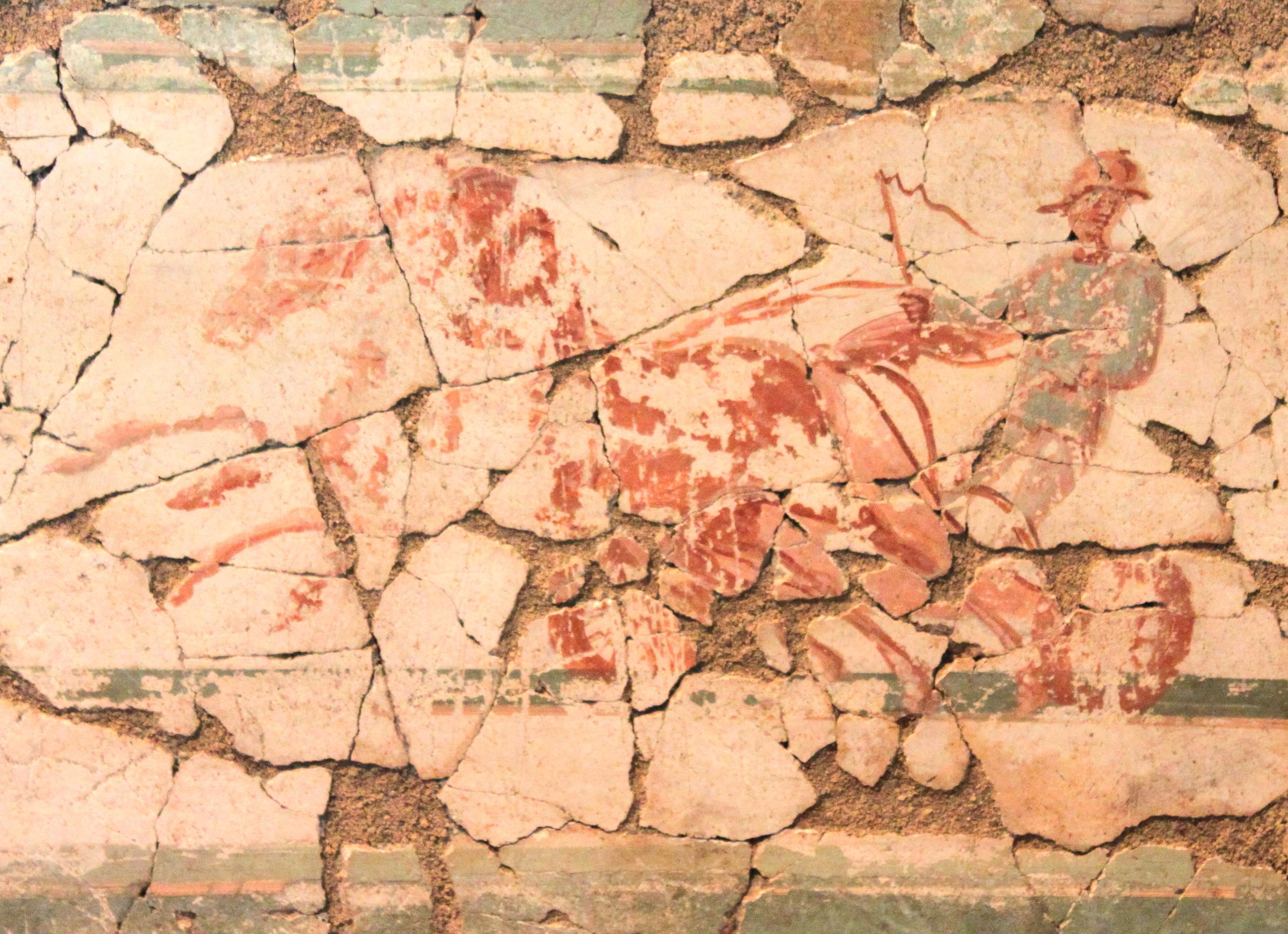 Suisse, canton de Vaud, Villa romaine du Prieuré, peintures murales, l'aurige.